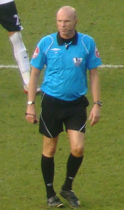 Steve Bennett refereeing Fulham v Spurs, 26 December 2009.